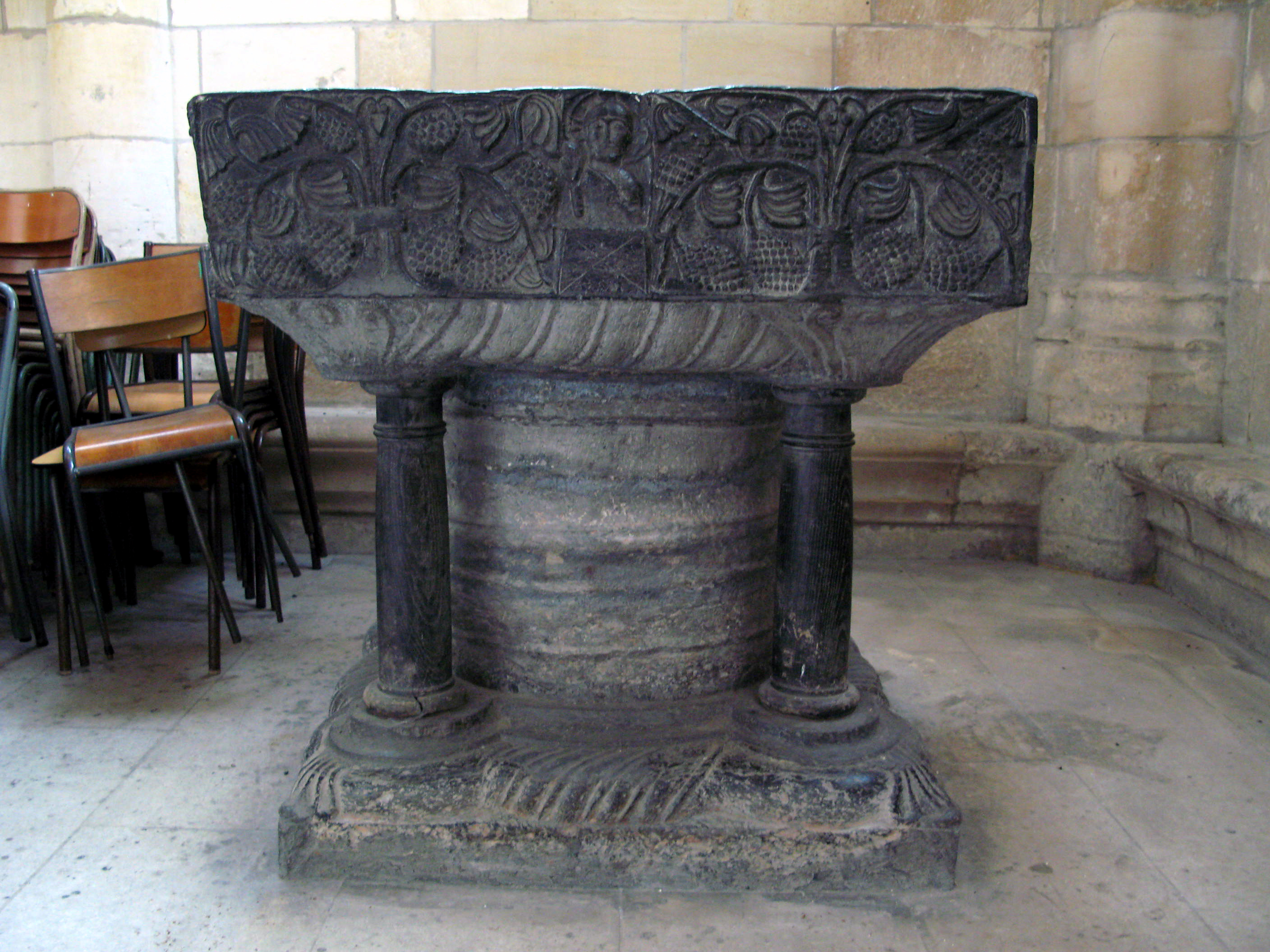 Montdidier (Somme, France) - Les fonts baptismaux de l'église Saint-Pierre. . .